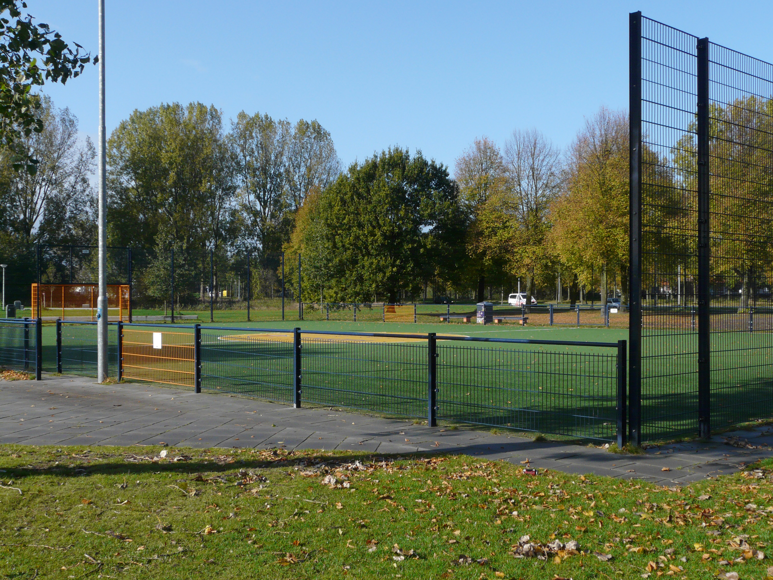 Zicht op een deel van het voetbalveld de Johan Cruyffcourt gevestigd aan de Hamdijk 1 in Breda. Gelegen in de wijk Biesdonk in het stadsdeel de Hoge Vucht in het noorden van Breda